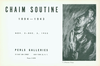 Chaim Soutine, 1894 - 1943: November 2 - December 5, 1953 New York: Perls Gallery, 1953